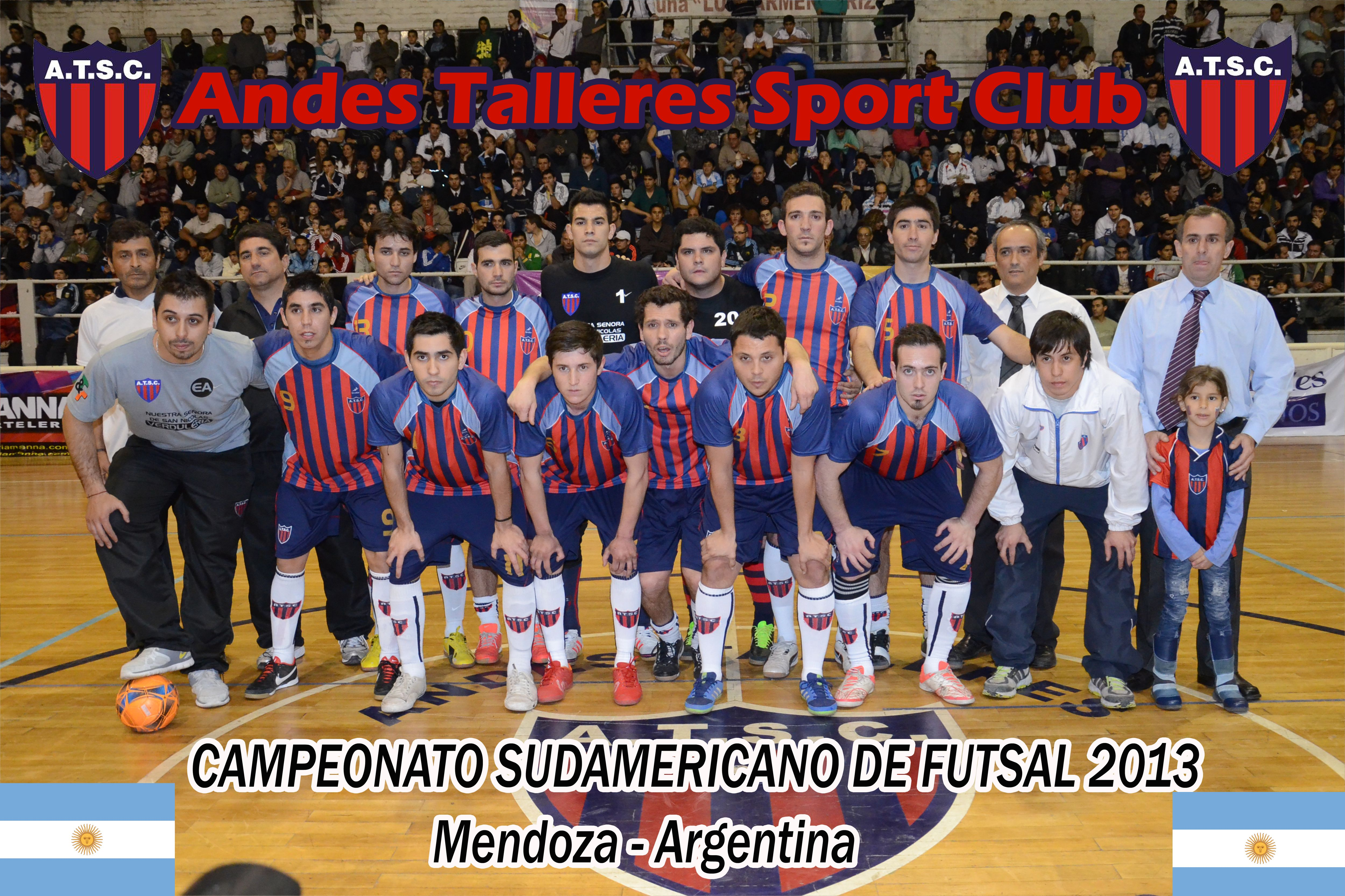 Equipe Campeã do Sul-Americano de Clubes de Futebol de Salão de 2013.